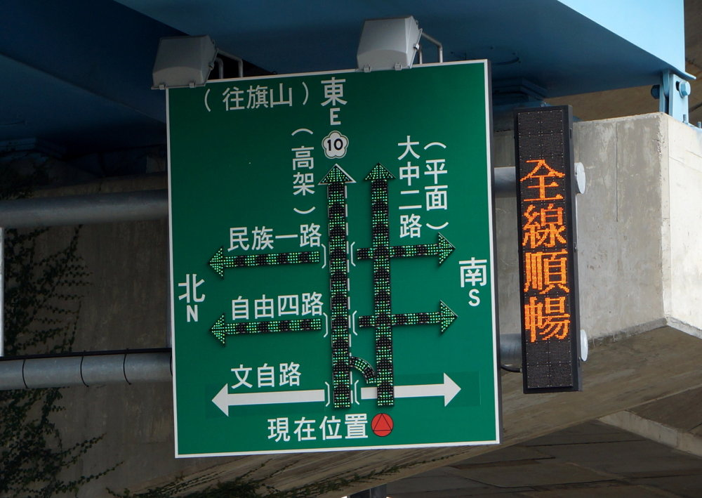 交通現況資訊板